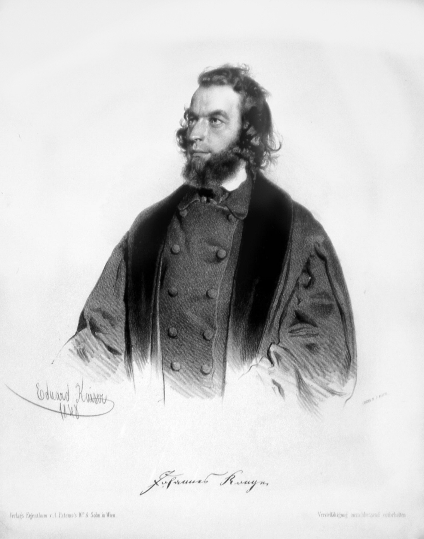 Johann Ronge, Lithographie von Eduard Kaiser, 1848